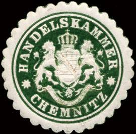 Sealing stamp Title: Handelskammer - Chemnitz Description: dunkelgrün, weiß, geprägt Place: Chemnitz size: 4 cm